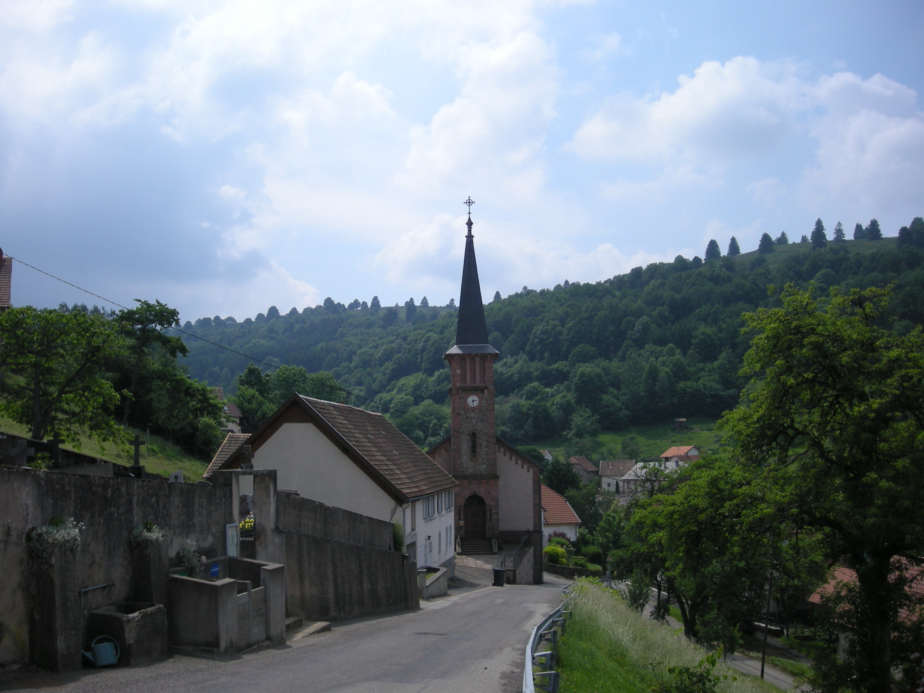 Eglise de Wildersbach (Bas-Rhin)